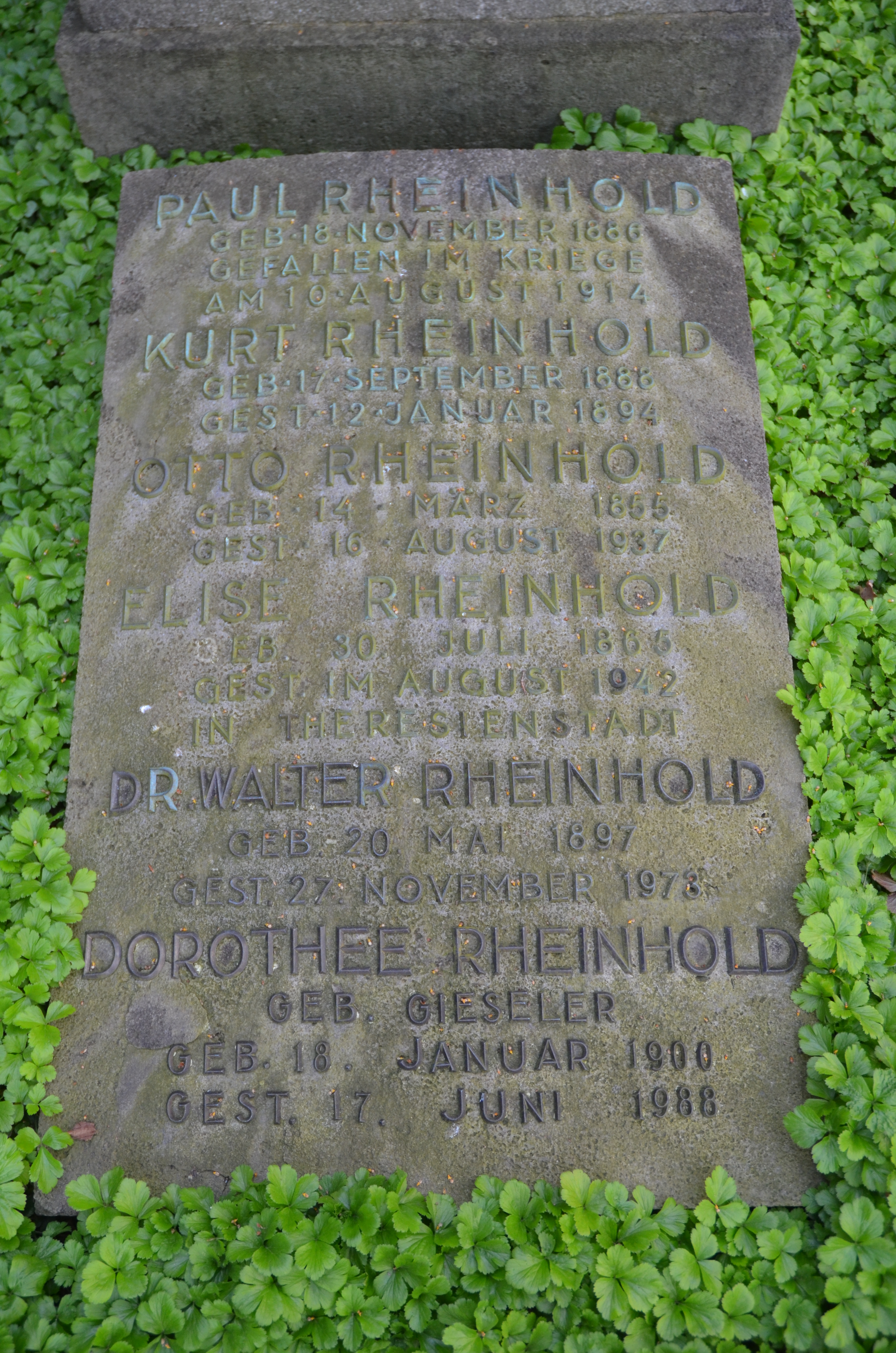 Erbbegräbnis der Familie Rheinhold, darunter der Fabrikant und Wohltäter Otto Rheinhold, auf dem Stadtfriedhof Stöcken in Hannover ...